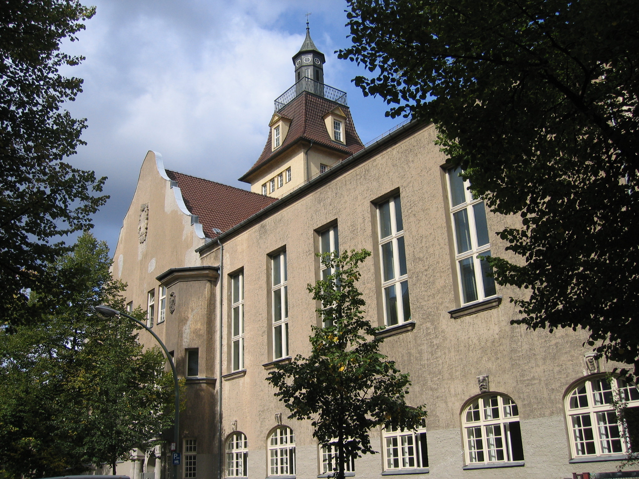 Askanische Oberschule, Berlin-Tempelhof, Kaiserin-Augusta-Str. 19/20